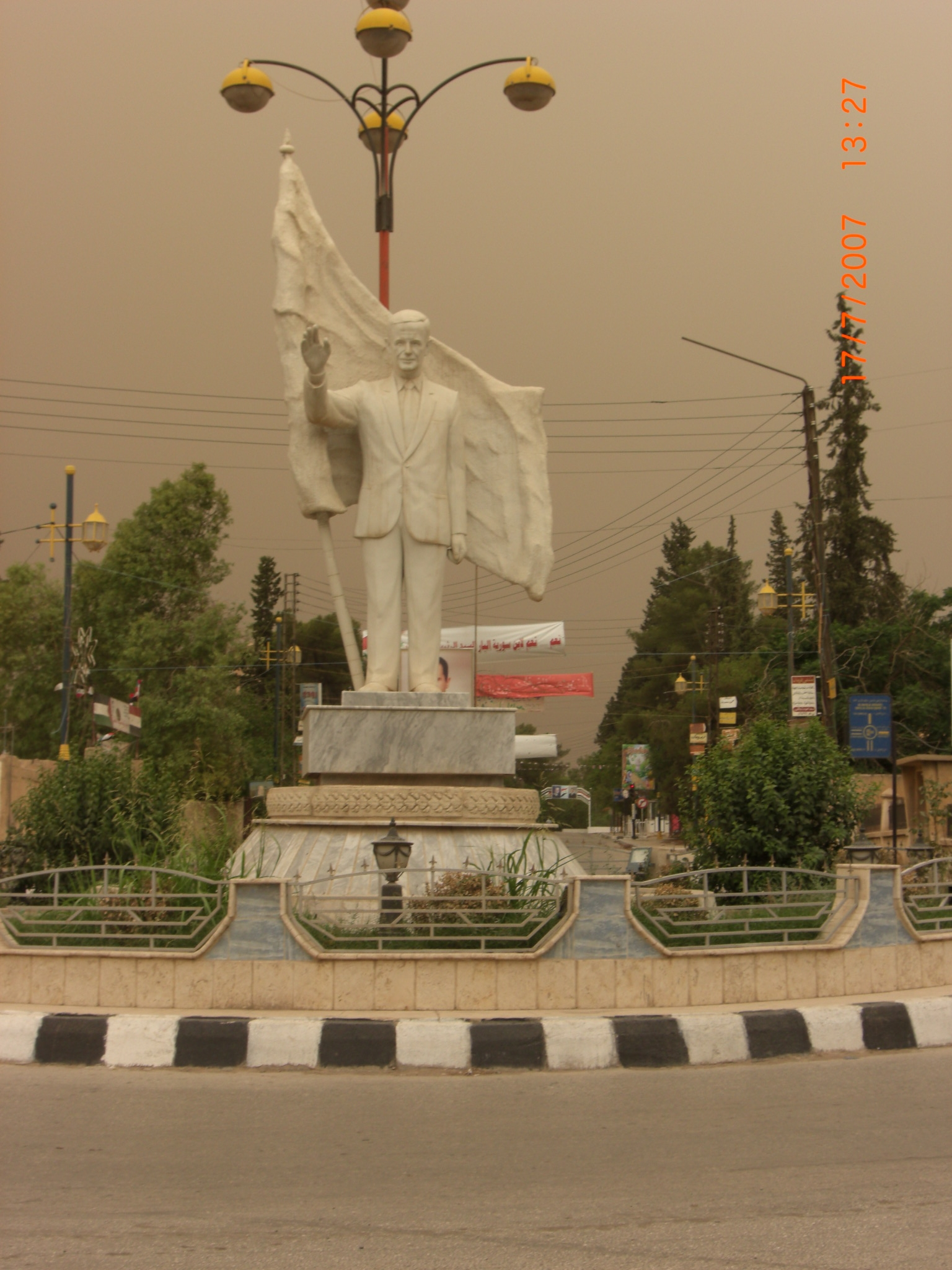 دوار السبع بحرات- دوار الرئيس حاليا